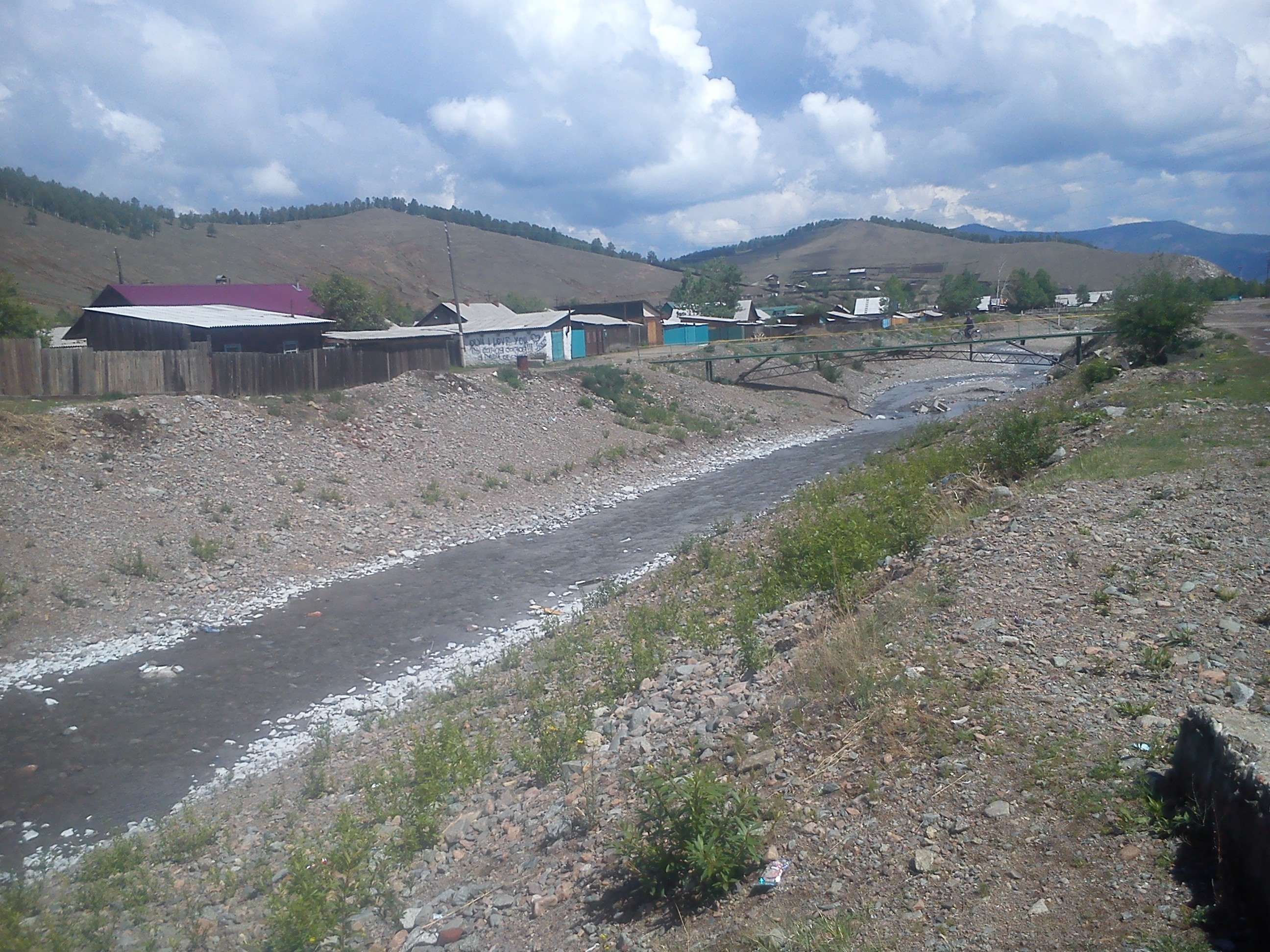 Речка Модонкуль в черте города Закаменск. Белая корка на прибрежной гальке - слой соли, отложившийся в период между наводнениями.